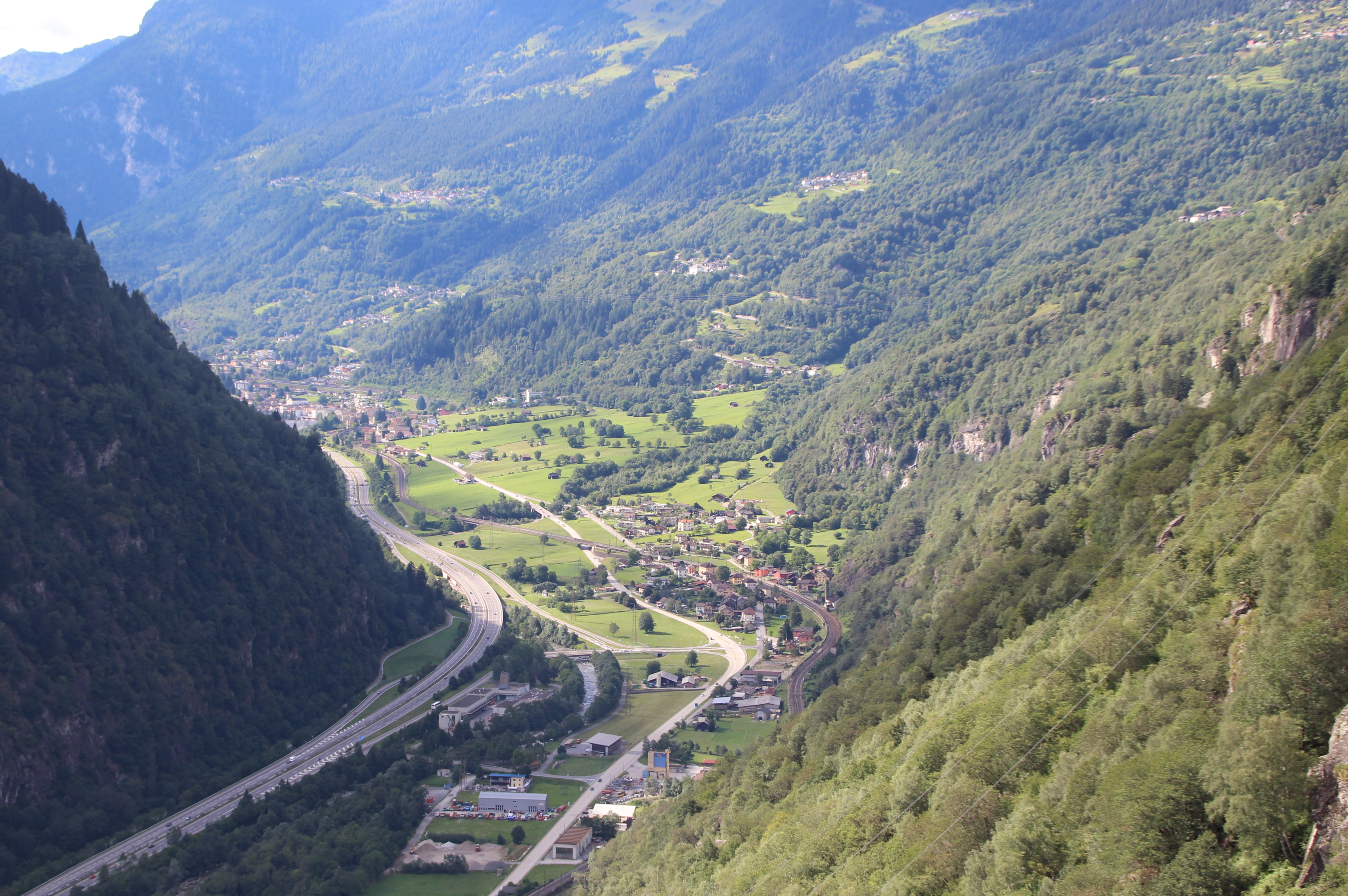 Chiggiogna, hinten Faido